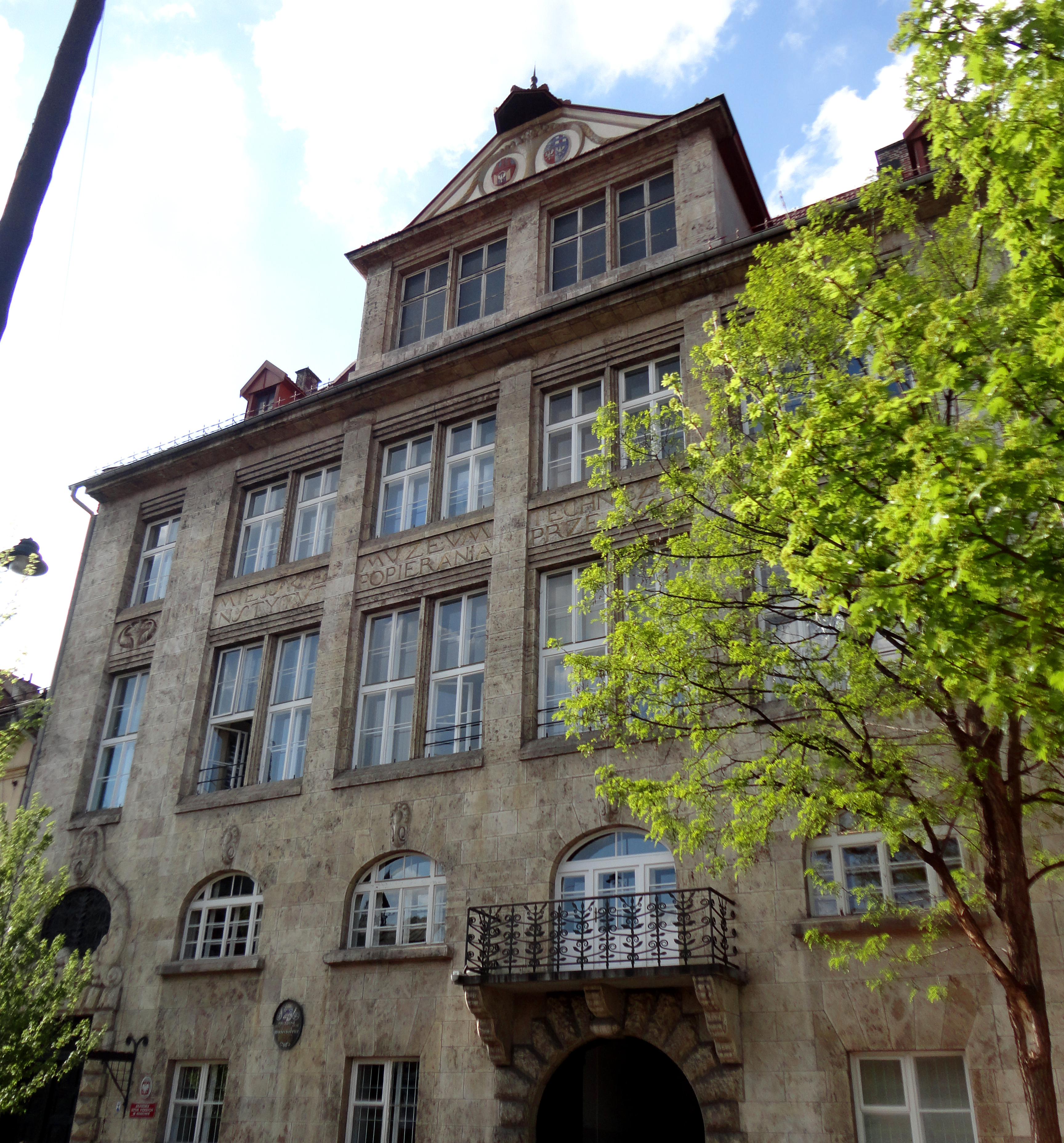 A Krakkói Képzőművészeti Akadémia Smoleńsk utcai épülete